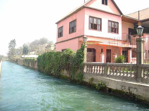 Casa en Chosica, al lado del Río Rímac. Fotografía tomada en Agosto del 2006.